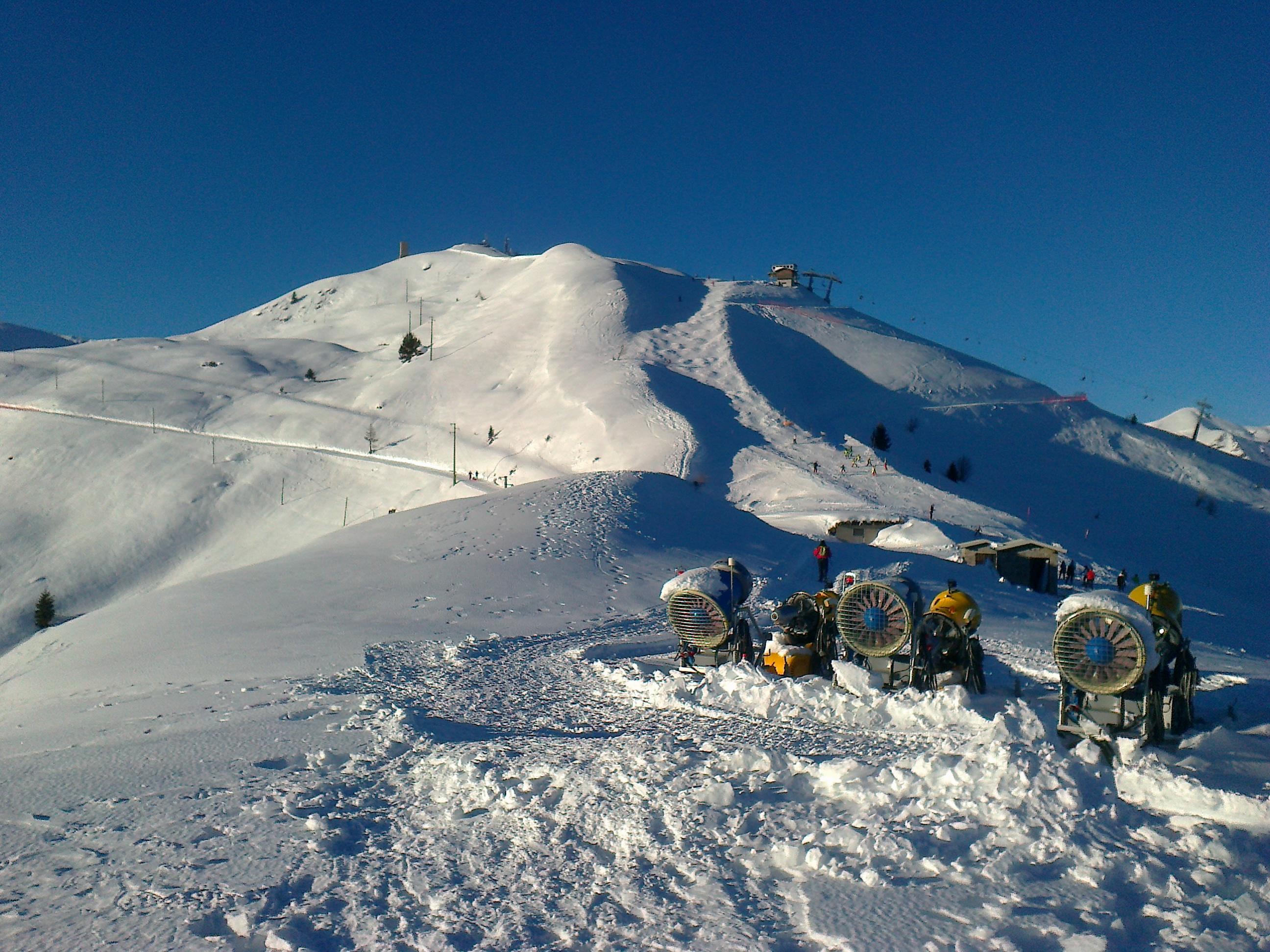 Cima Maniva vista dal passo Maniva